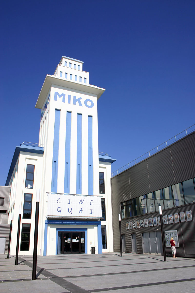 Construite dans les années 1930, cette tour était une partie de l'usine Miko de Saint-Dizier. Depuis 2006, elle sert de hall d'accueil pour le cinéma multiplexe Ciné Quai.